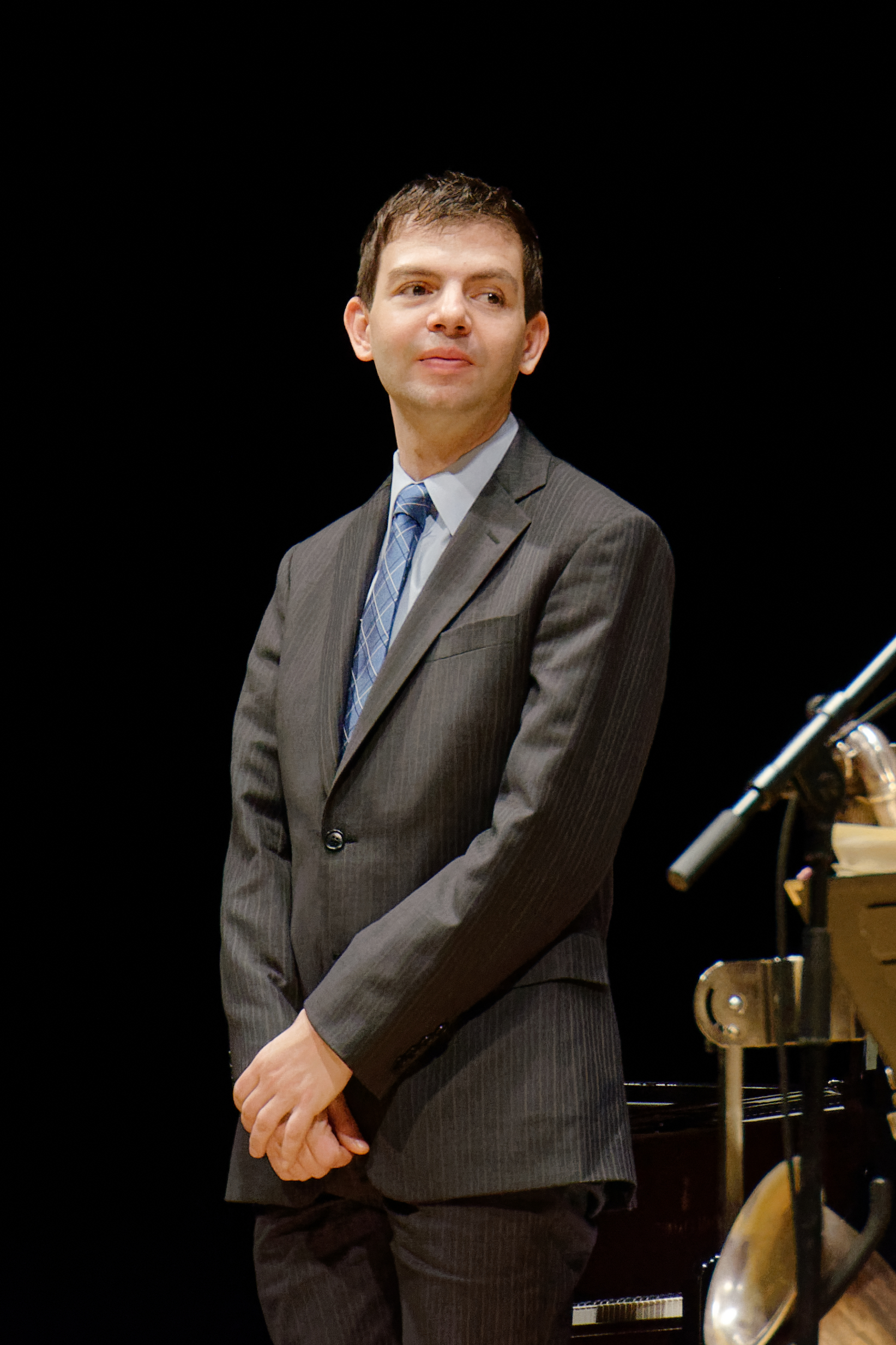 Le pianiste américain Dan Nimmer en concert avec Jazz at Lincoln Center Orchestra - Lyon 2016